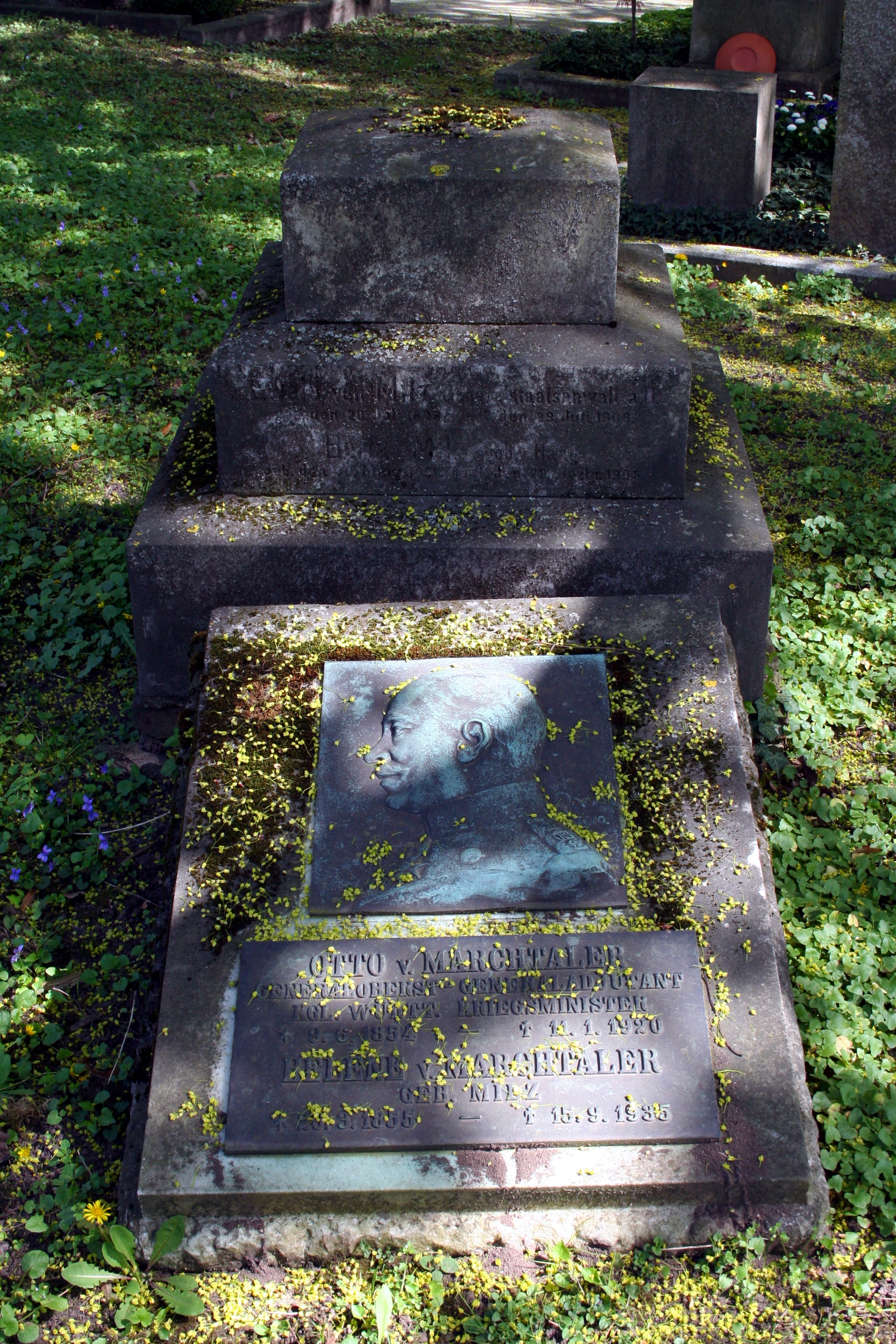 Grab von Otto von Marchtaler auf dem Pragfriedhof in Stuttgart